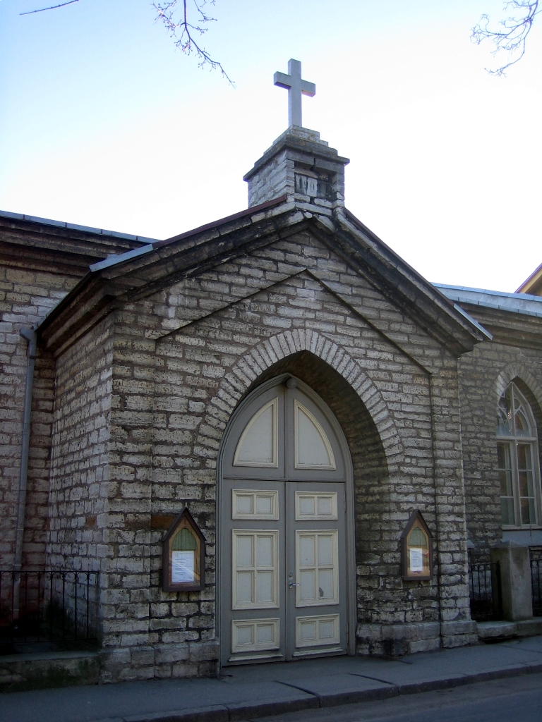 Tallinna Kalju baptistikoguduse kiriku peasissekäik